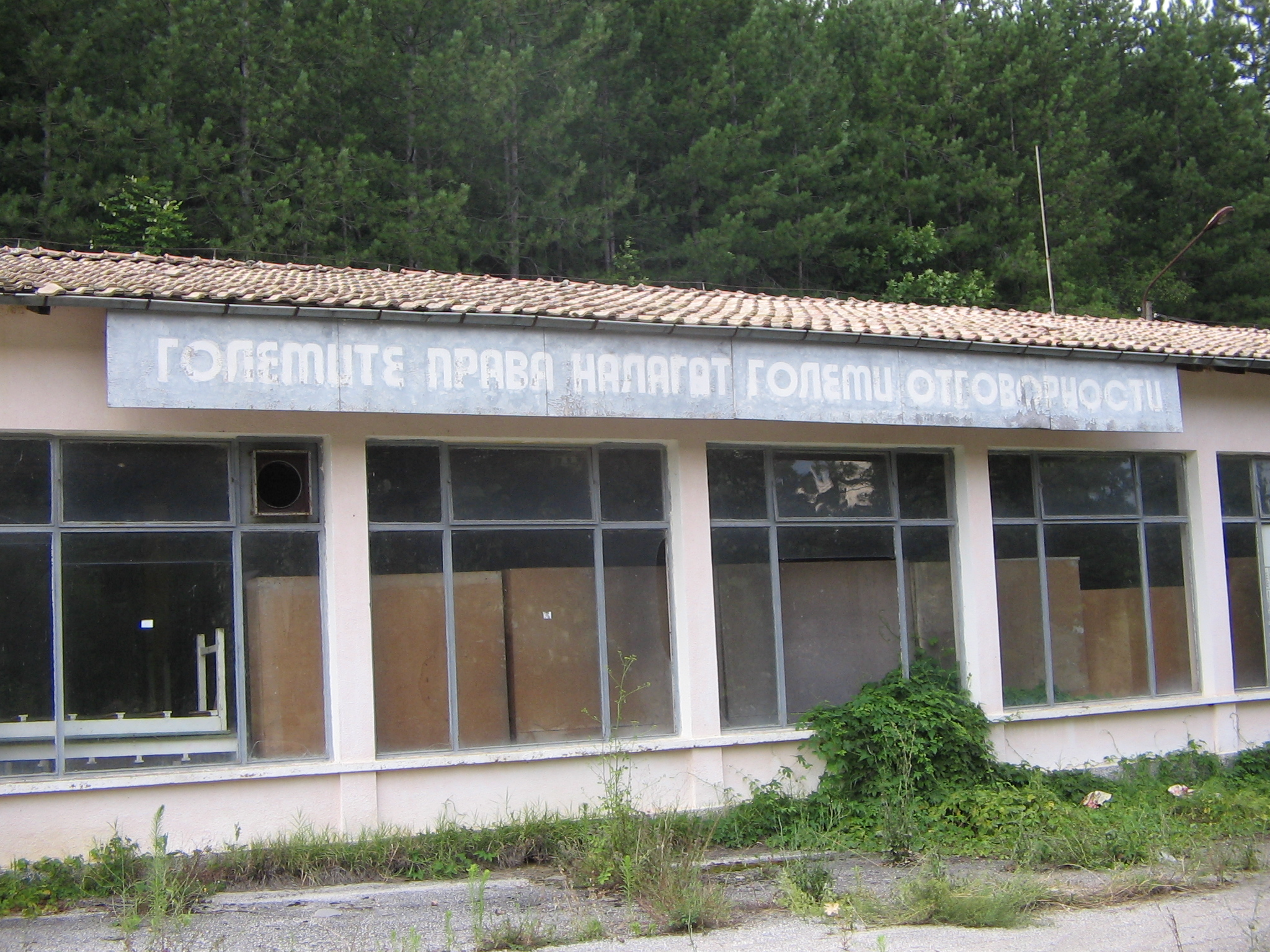 столовата в бившия учебен военен лагер